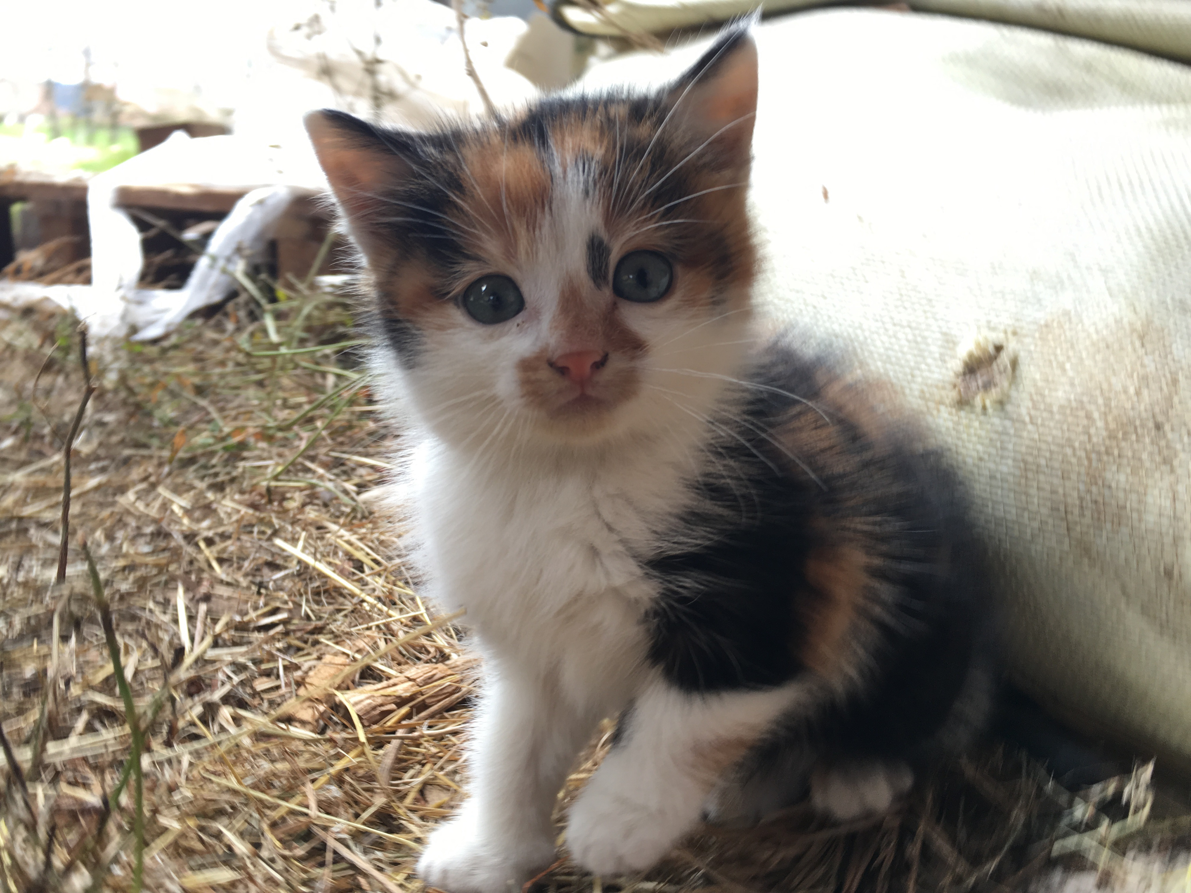 Chaton tricolore de quelques semaines